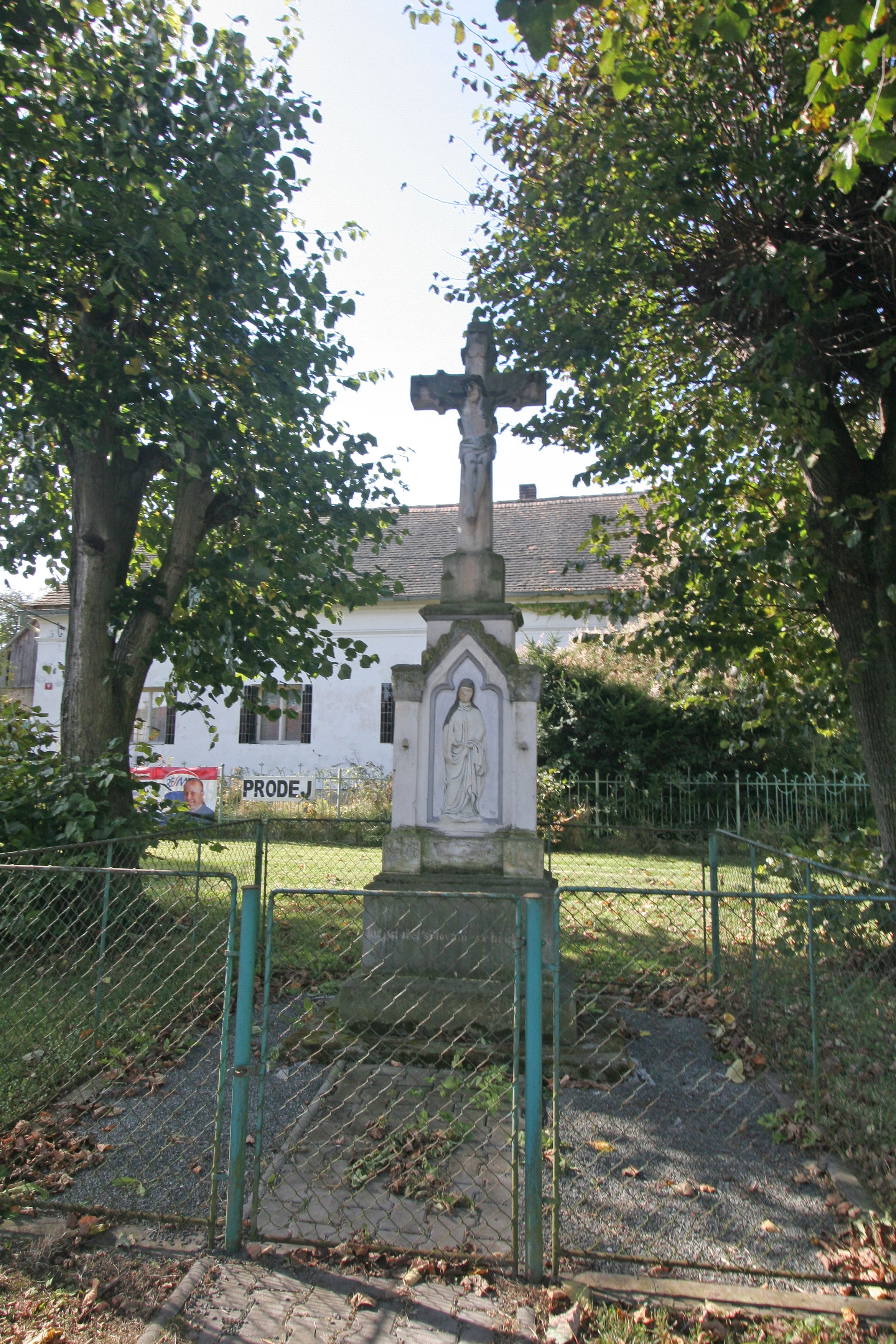 Poběžovice u Přelouče křížek